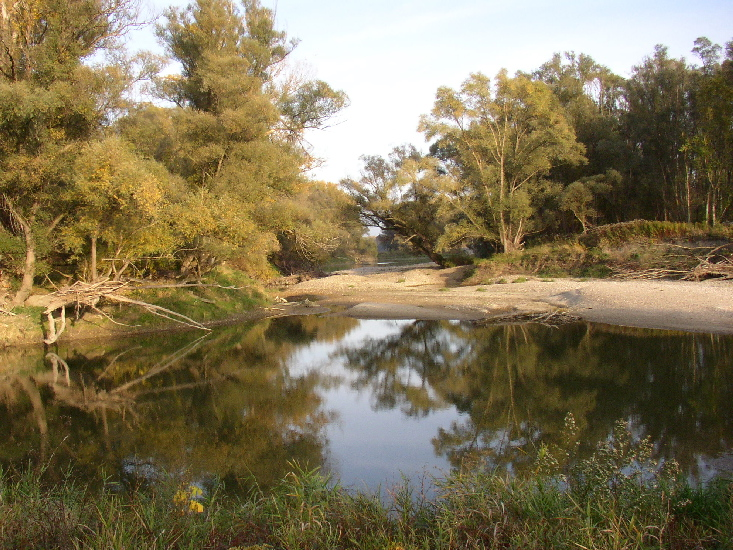 Altarm der Donau-Auen bei Schönau. Landschaft im Nationalpark Donau-Auen bei Niedrigwasser im Herbst. Bei höherem Wasserstand ist der in den Hintergrund verlaufende Arm geflutet, seit versucht wird, die Altarme wieder direkt mit der Donau zu verbinden.